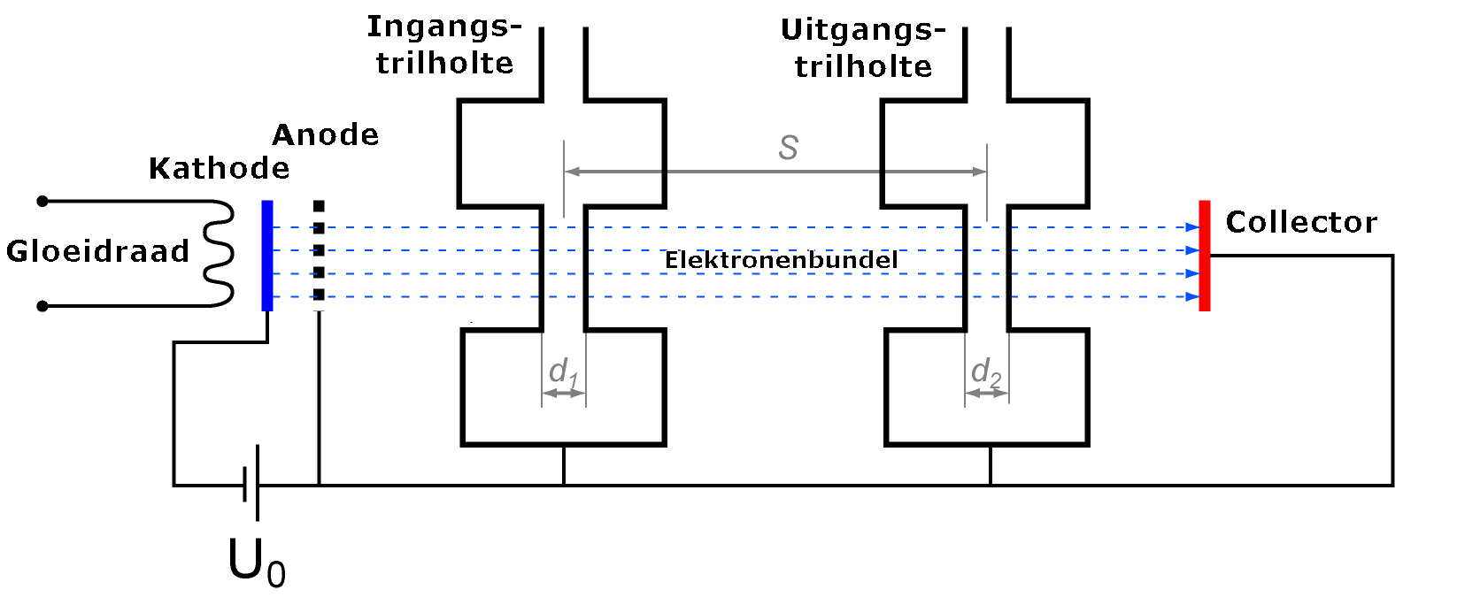 Werking van een klystron. Vertaald van ru.wikipedia